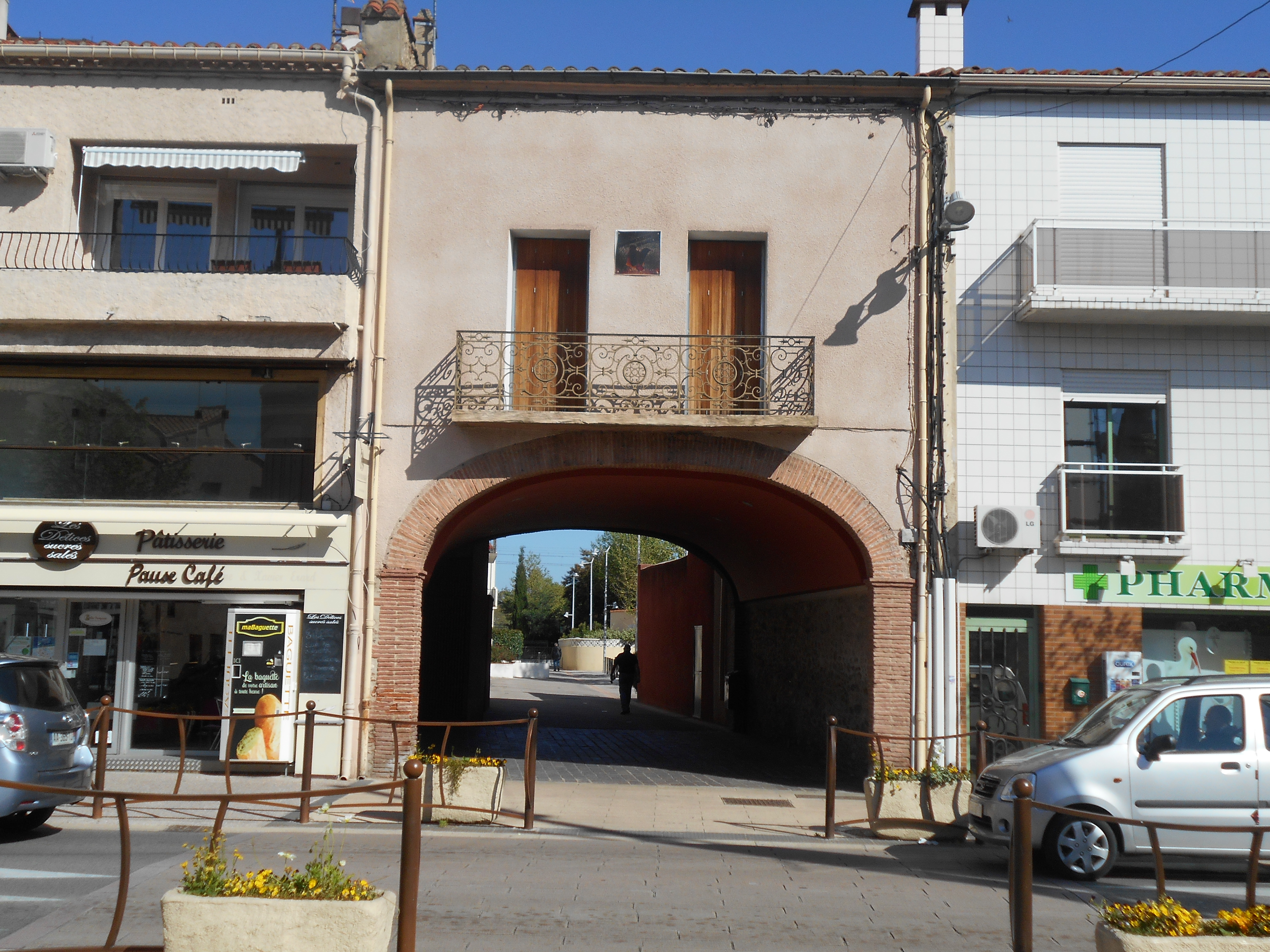 Antiga fàbrica de suros Torrent, del Voló.